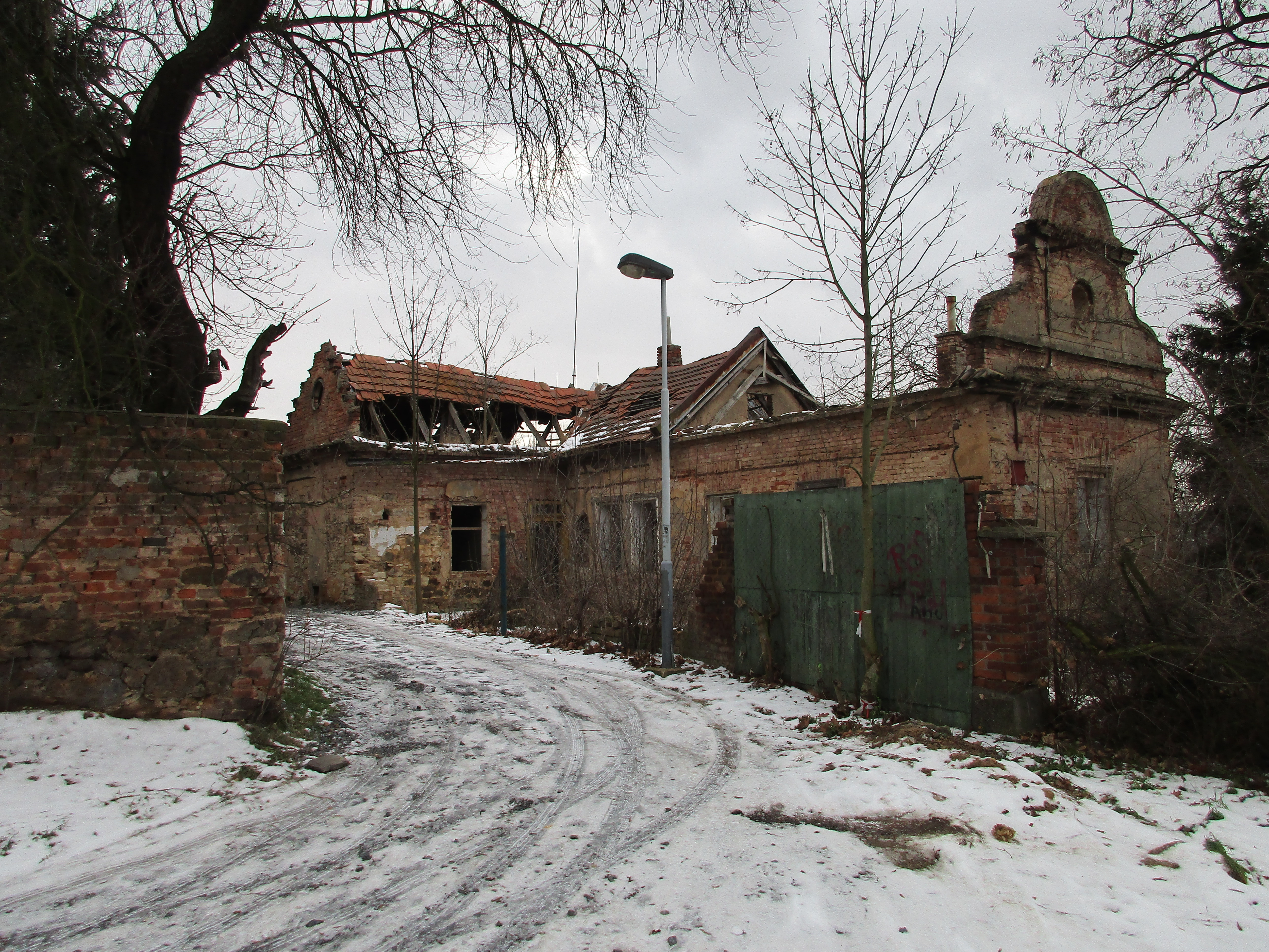 Usedlost Farka.